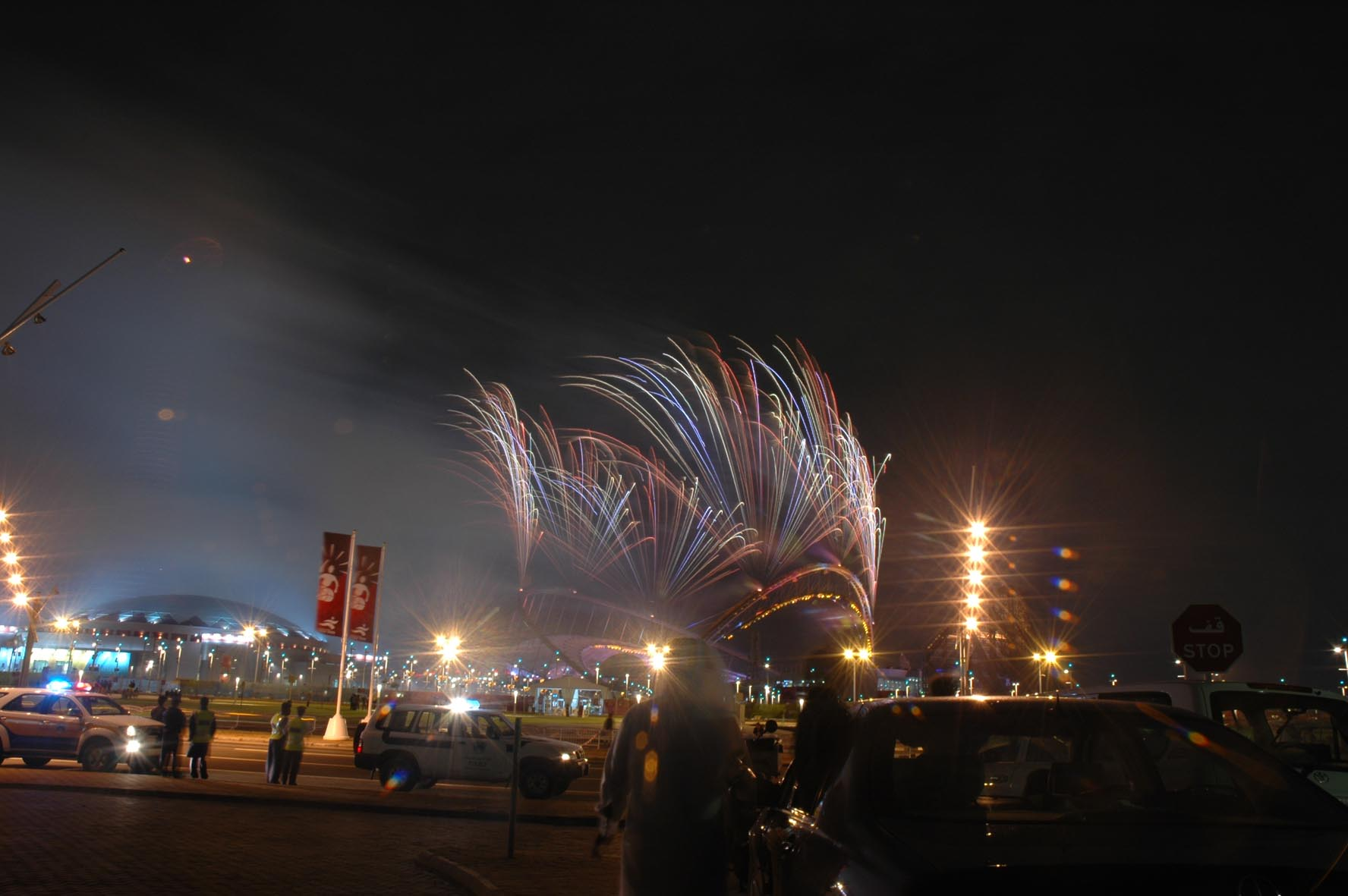 2006年亞洲運動會開幕晚會煙火。